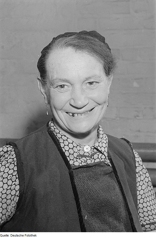 Original image description from the Deutsche FotothekPortrait von Margarete Rupp, einer Arbeiterin in der Mitteldeutschen Kammgarnspinnerei